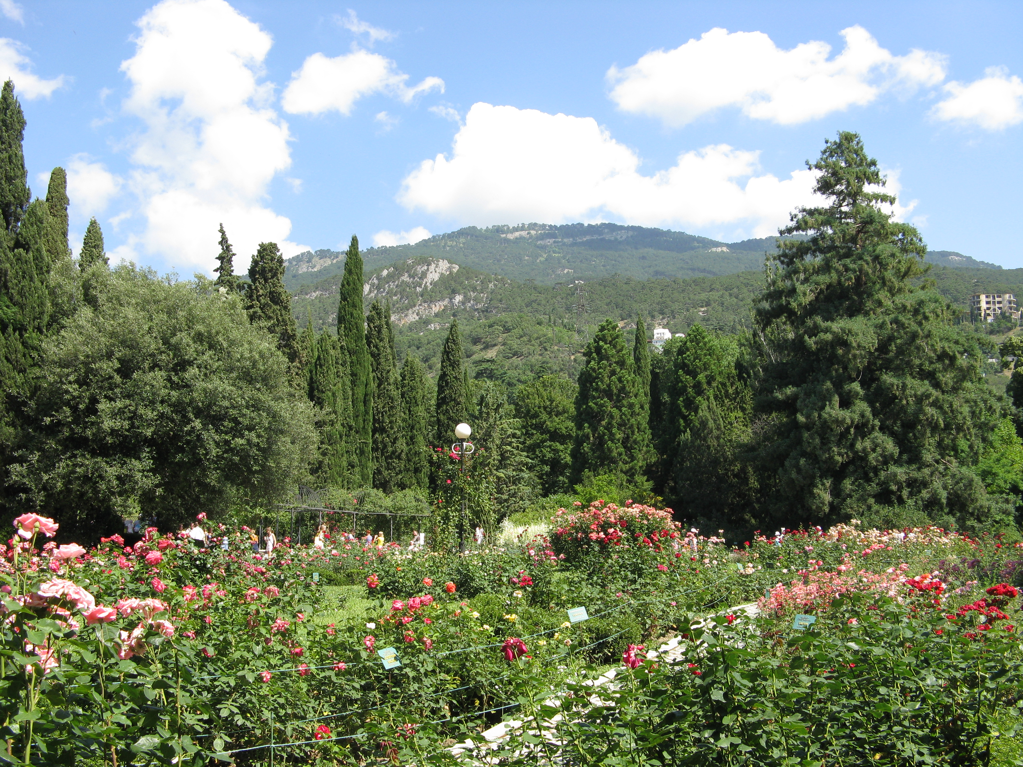 красивый парк